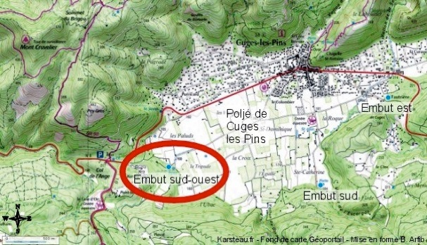 Plan détaillé de la plaine de Cuges a localisation des embuts